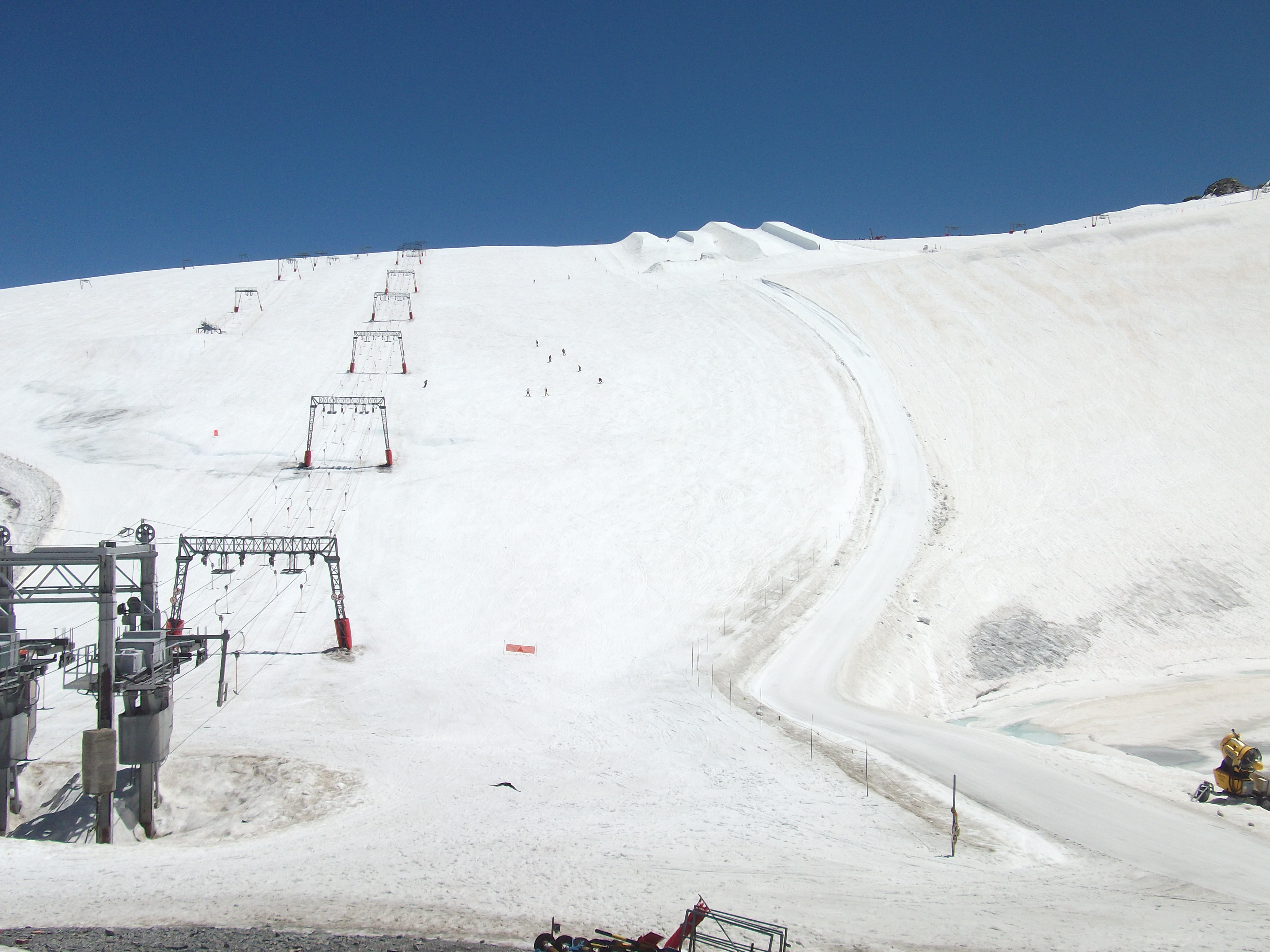 Glacier de Mont-de-lans